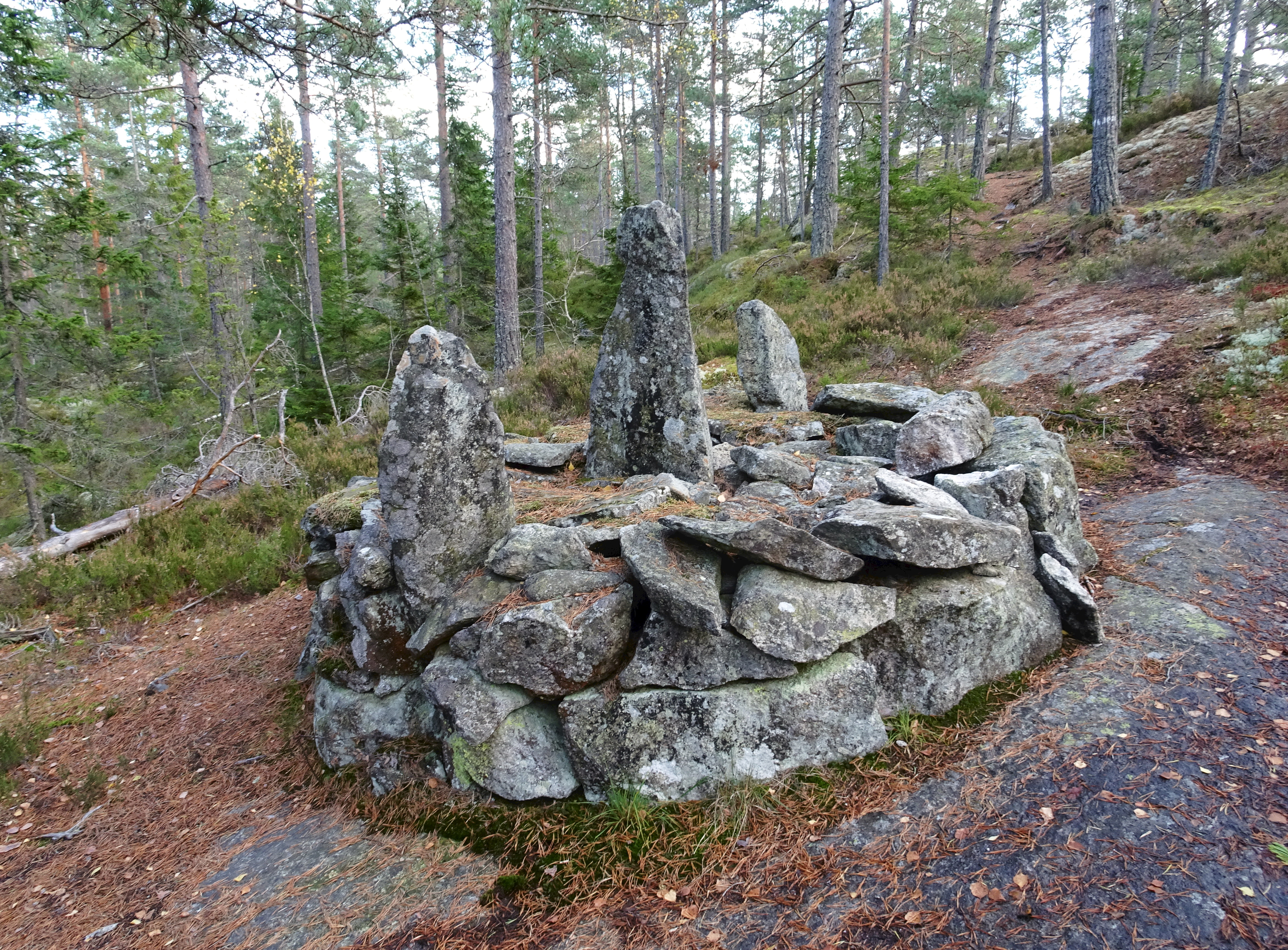 Stenröse vid nordöstra sidan av Tornberget